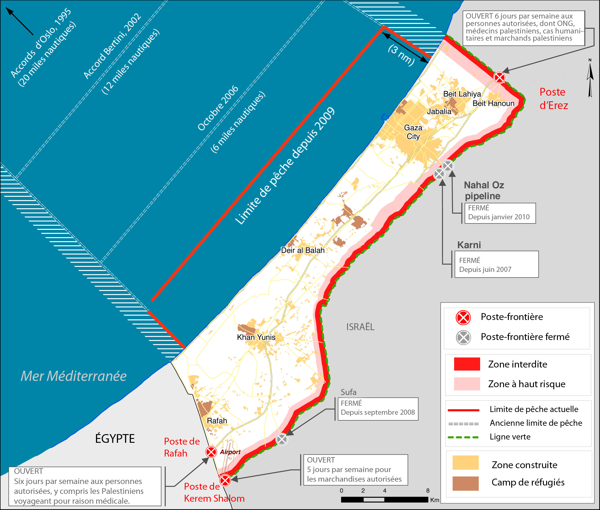 Carte du blocus de la bande de Gaza. D'après "Gaza in 2020 : a liveable place ?", rapport de l'ONU d'août 2012.